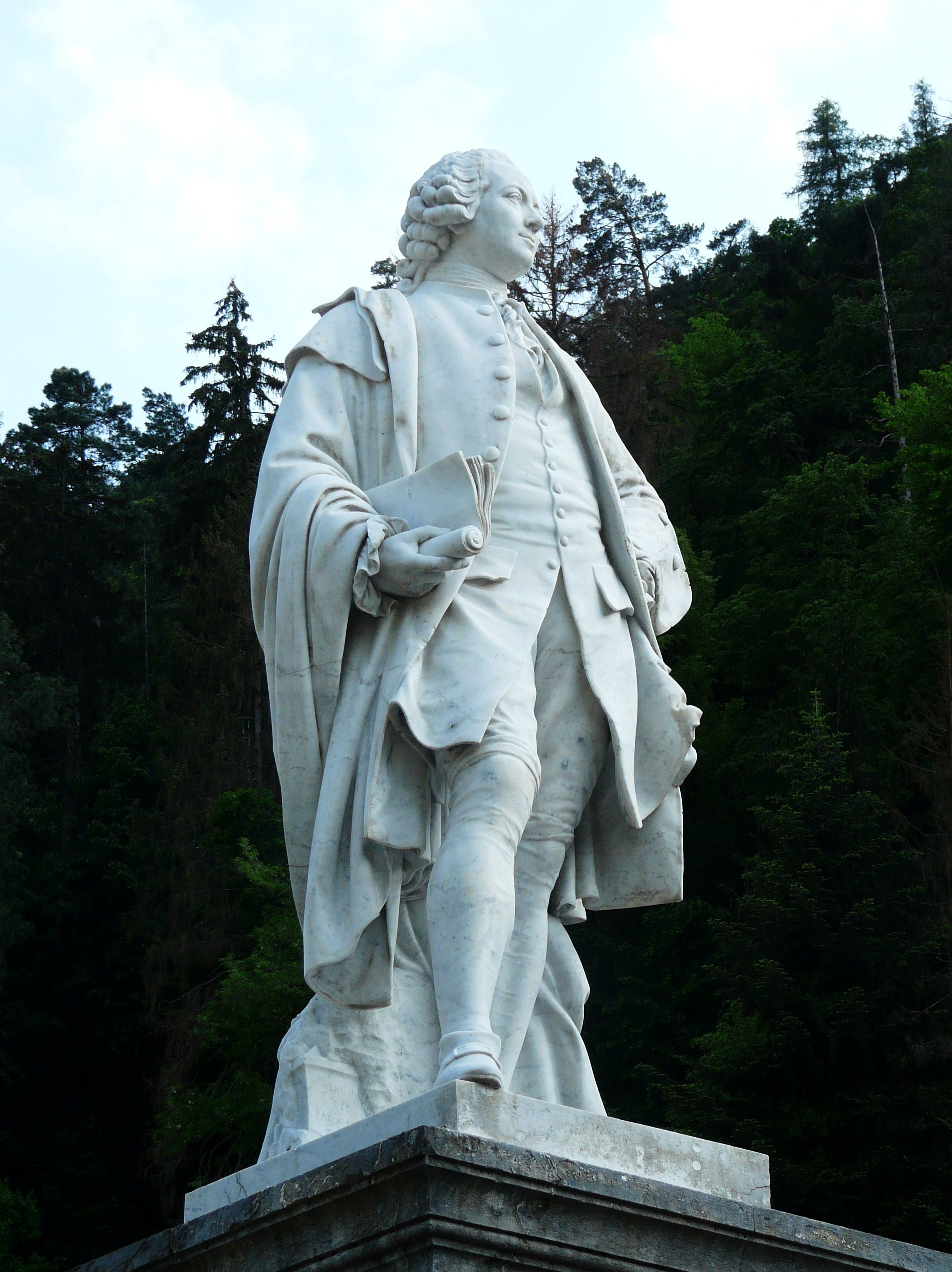 Statue du baron Antoine Mégret d'Étigny, réalisée en 1889 par Gustave Crauk, Bagnères-de-Luchon, Haute-Garonne, France.